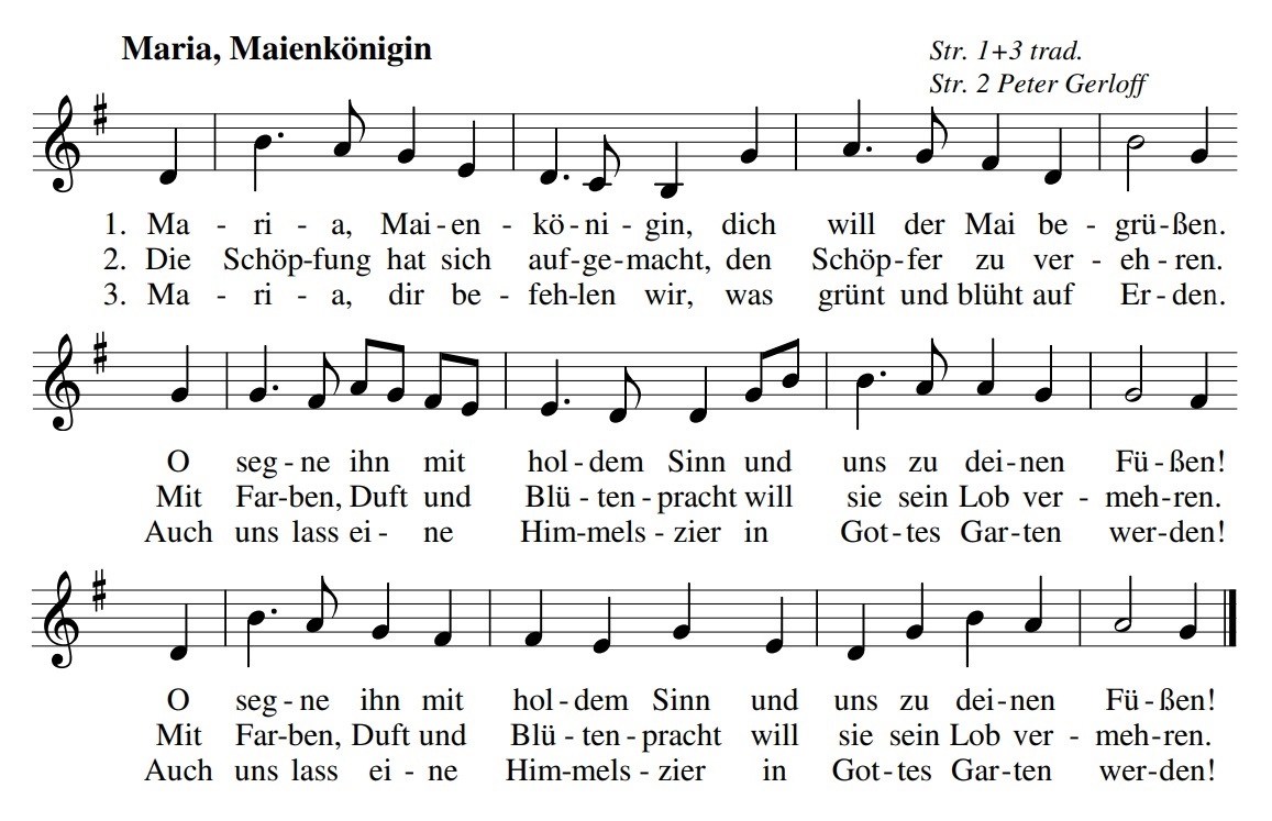 Maria, Maienkönigin, dreistrophige Version